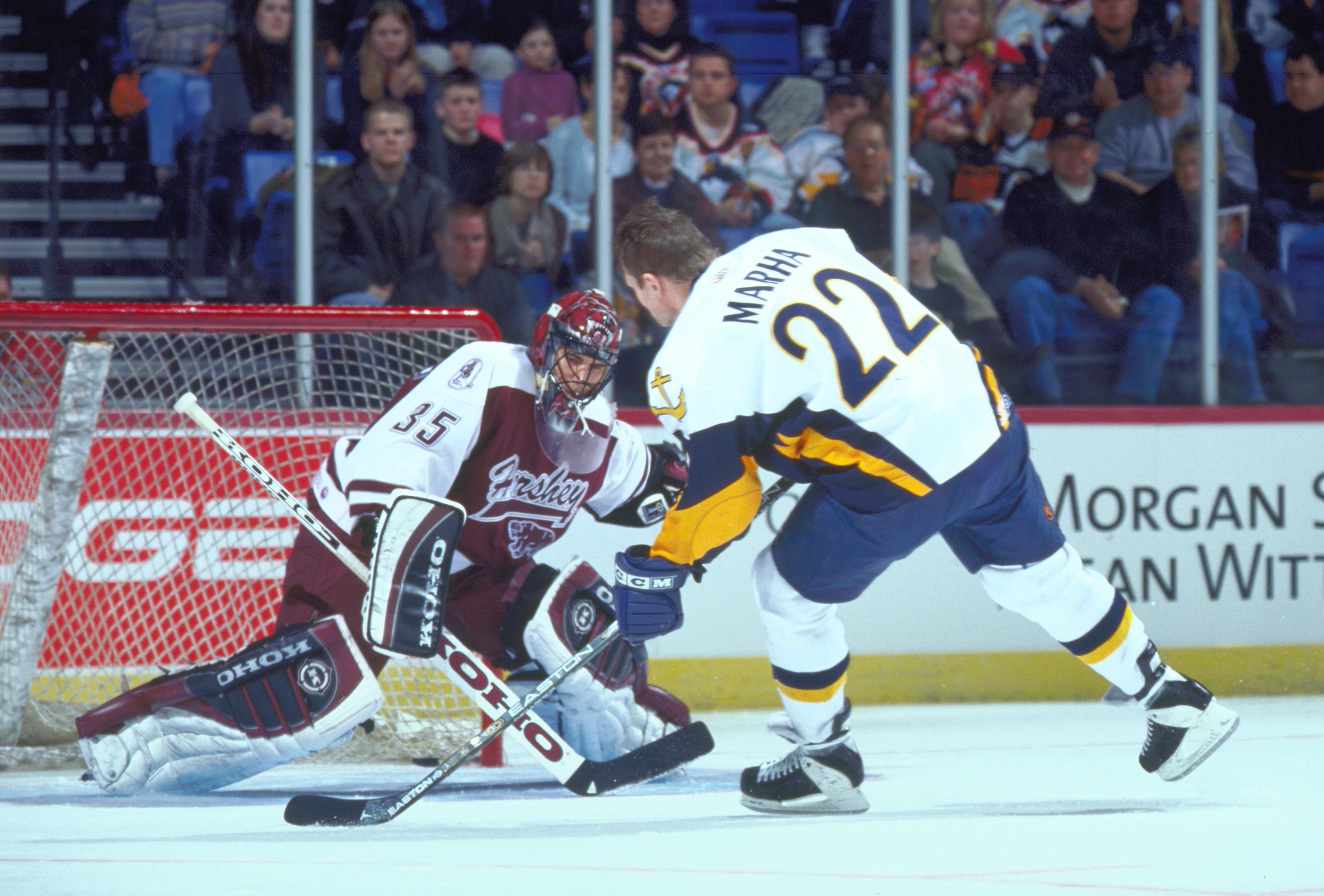 ahlstar0190